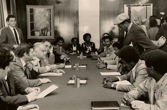 ברוך טגניה במפגש עם ראש הממשלה יצחק שמיר, שר הקליטה יעקב צור, ראש מחלקת העלייה והקליטה בסוכנות היהודית, חיים אהרן, ואחרים.